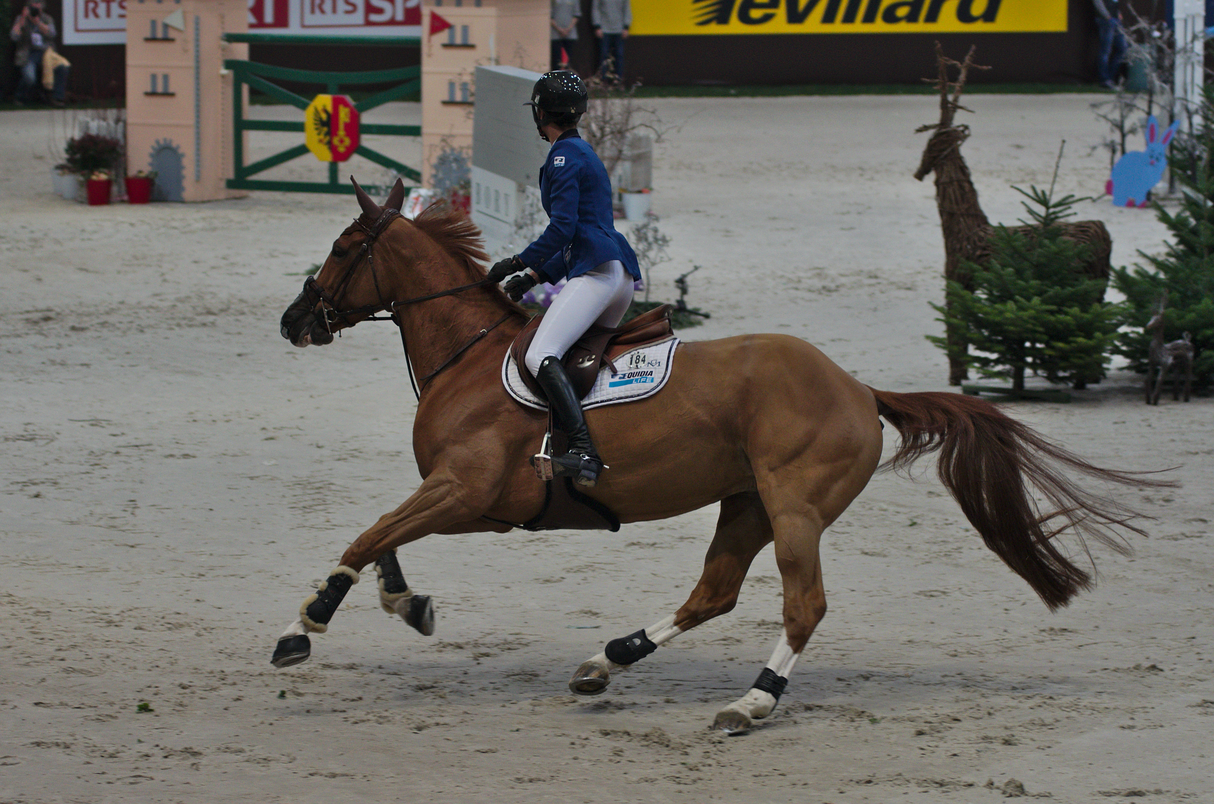 54eme CHI de Genève - 20141212 - Pénélope Leprevost et Flora de Mariposa